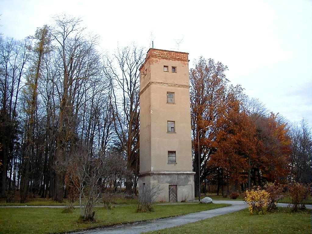 Laidzes muižas tornis. 2000-10-28